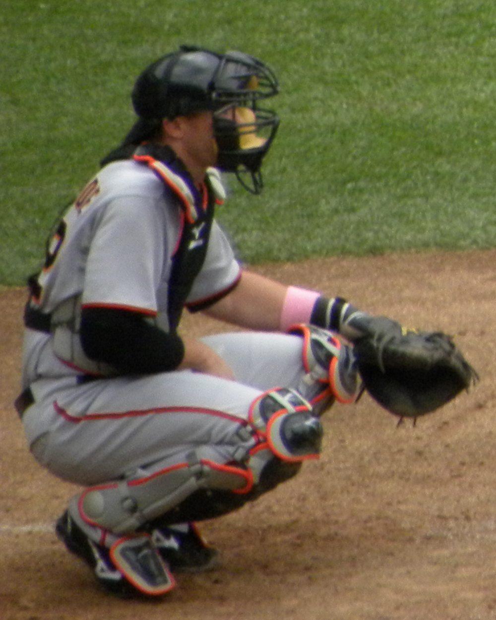 Eli Whiteside